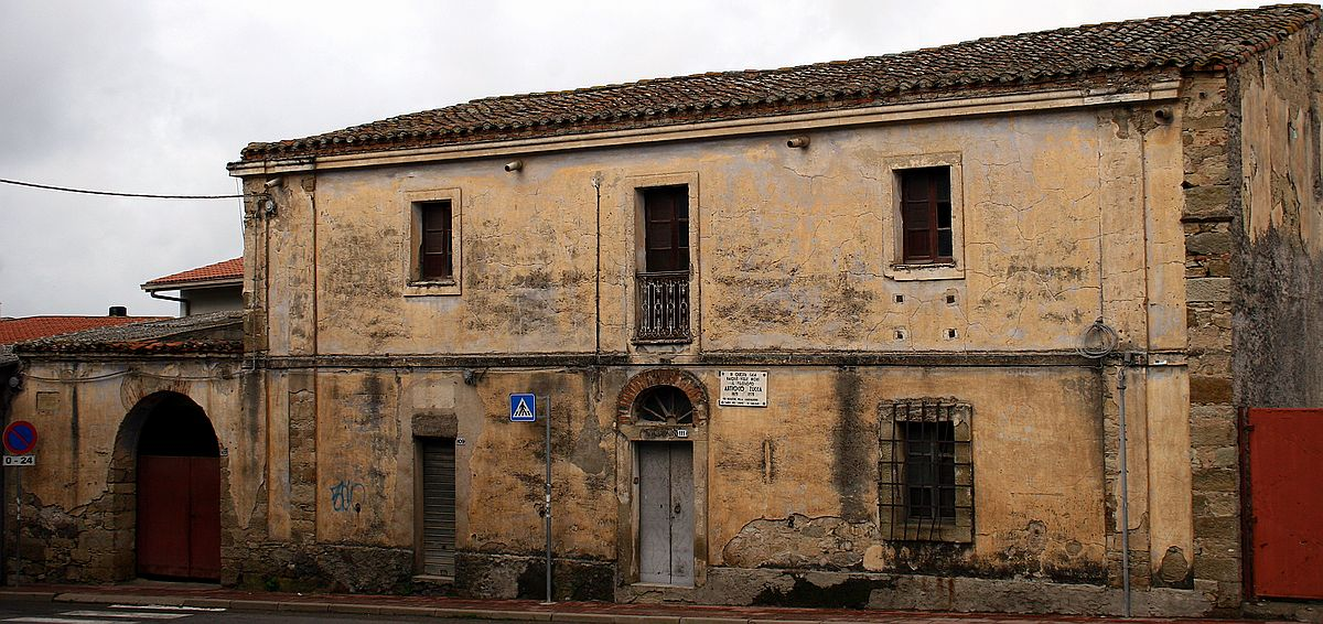 Villaurbana. Das unbewohnte Geburtshaus von Antioco Zucca, sardischer Philosoph. Das Haus wurde circa 1860 vom Vater erbaut, nähe Zentrum von Villaurbana.